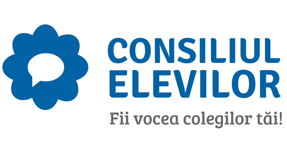 Sigla Consiliului Naținal al Elevilor